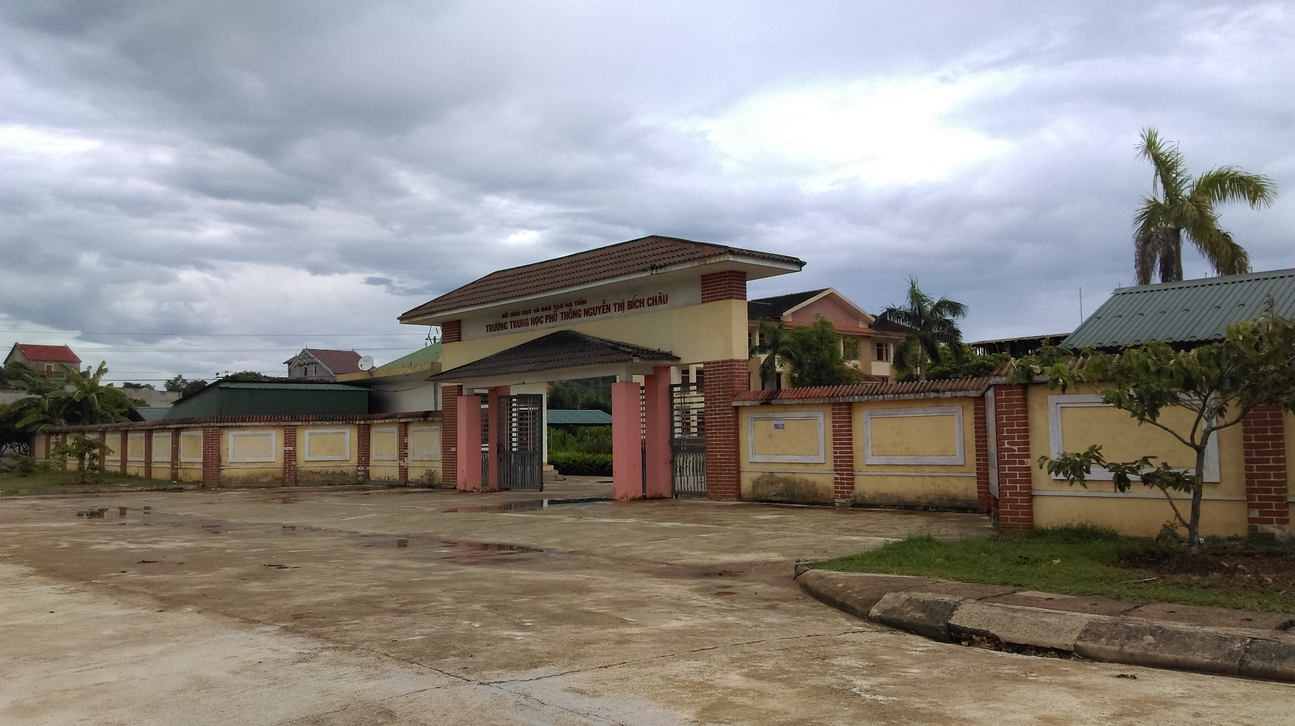 Trường THPT Nguyễn Thị Bích Châu, Kỳ Thọ, Kỳ Anh, Hà Tĩnh